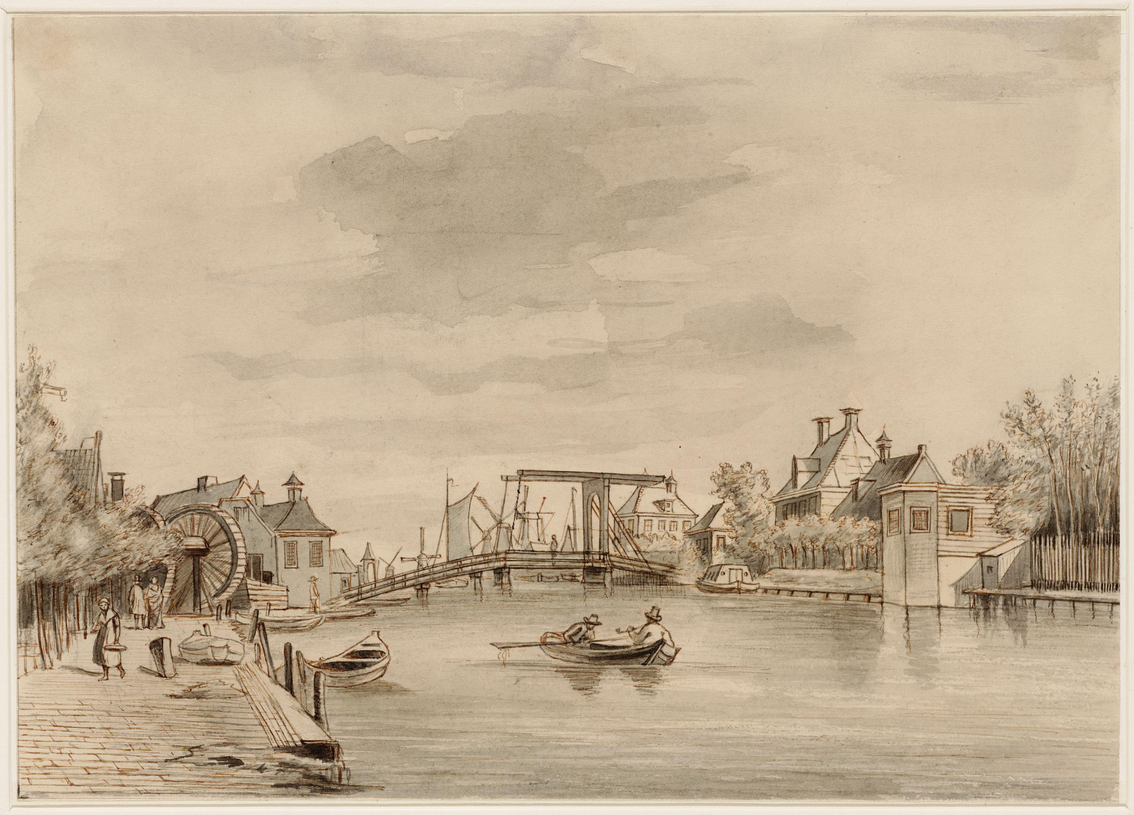 Beschrijving Kostverlorenvaart en links de Baarsjesweg in het verkort gezien in noordelijke richting Op de achtergrond links: Overhaal bij de Baarsjes. In het midden: Tolbrug over Kostverlorenvaart voor Lange Bleekerspad. De Tolbrug is de voorganger van de huidige Wiegbrug, Brug 173. Techniek: pen in bruin, penseel in grijs. Documenttype tekening Vervaardiger Onbekend Anoniem Collectie Collectie Stadsarchief Amsterdam: tekeningen en prenten Datering 1800 ca. t/m 1850 ca. Geografische naam Baarsjesweg Lange Blekerspad Kostverlorenvaart Inventarissen Afbeeldingsbestand 010097002187